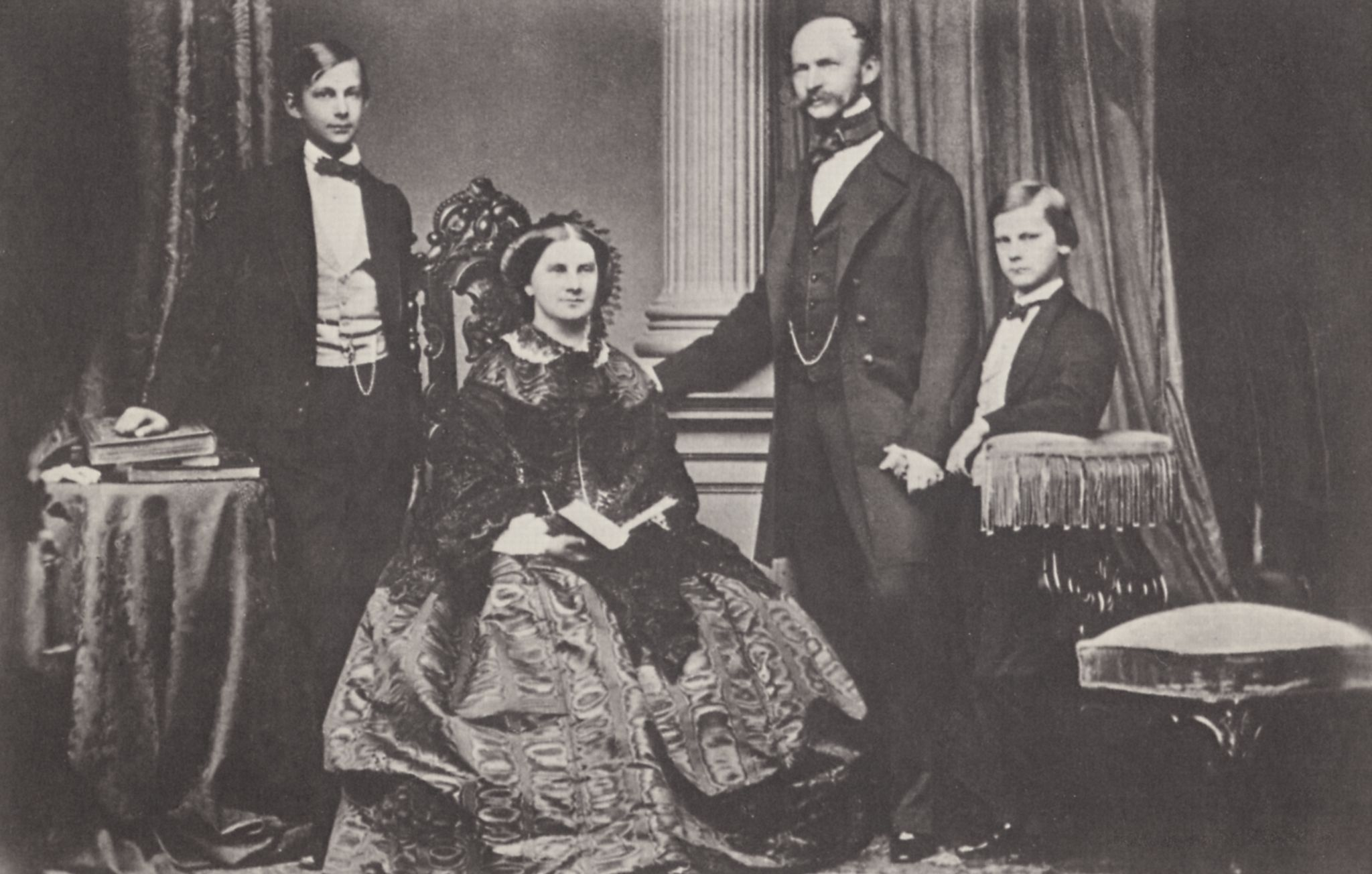 Albert, Joseph: König Maximilian II. mit Familie